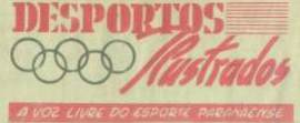 jornal desporto ilustrado